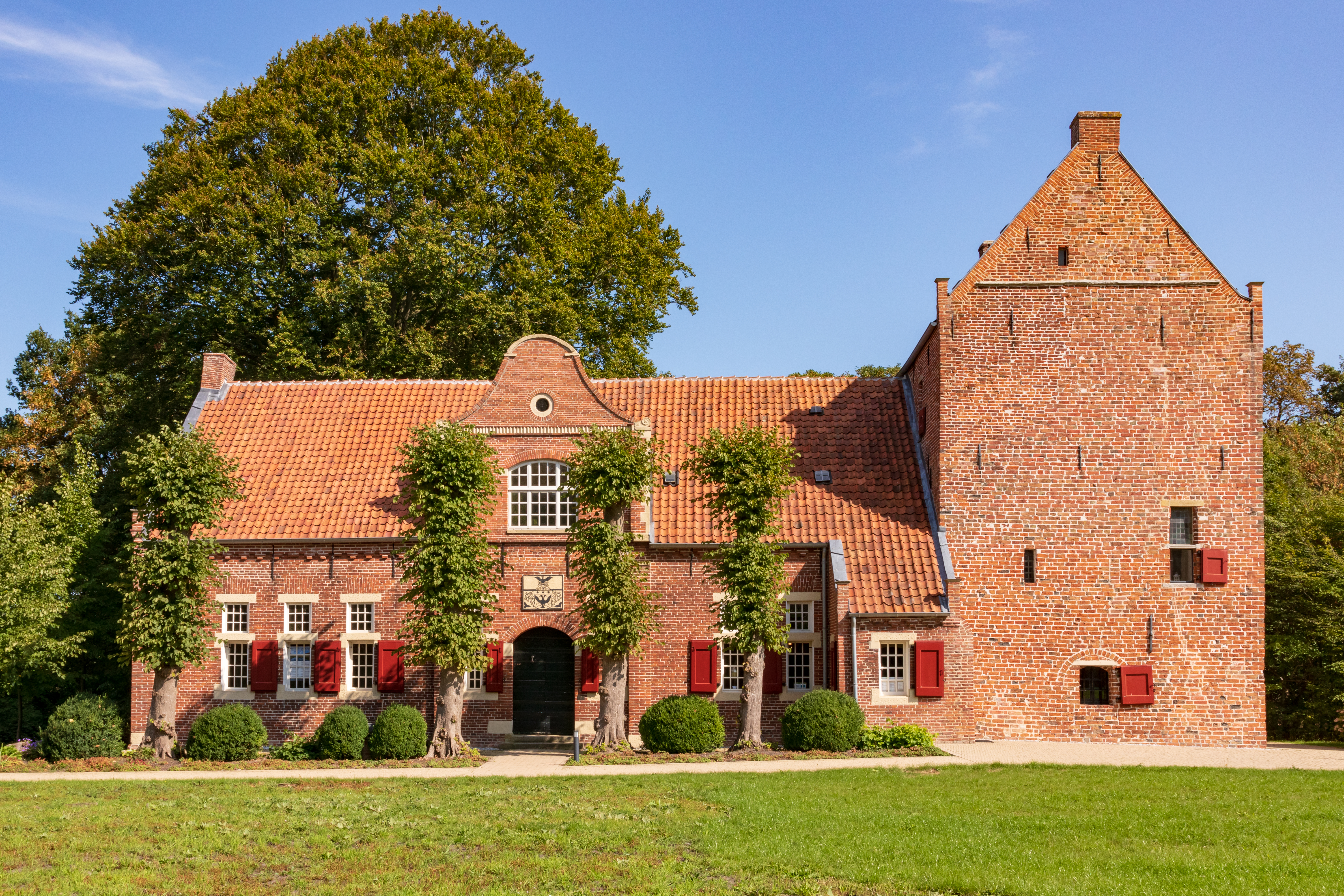 Steinhaus Bunderhee. Mehrgeschossiger turmartiger Backsteinbau aus dem 14. Jahrhundert. Rest einer häuptlingsburg. Im Westen anschließender eingeschossiger Barockbau unter Verwendung älterer Bausubstanz, "1712"; Bedeutung: historisch, wissenschaftlich; wesentliche Begründung: 1.05 geschichtliche Bedeutung aufgrund des Zeugnis- und Schauwertes für Bau- und Kunstgeschichte; Einzeldenkmal gemäß § 3.2 NDSchG; in Gruppe baulicher Anlagen: 457024Gr0008